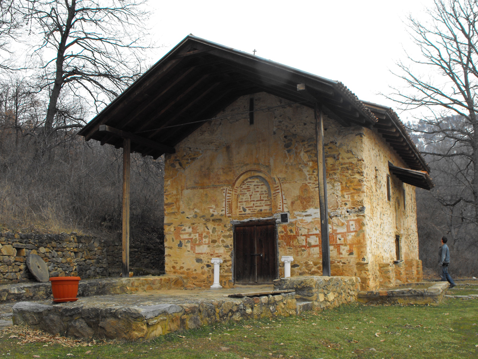 Входът на църквата "Свети Георги", Курбиново.